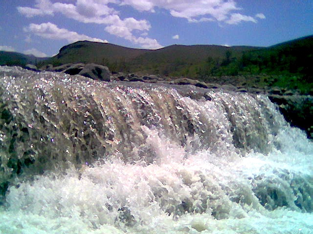 sel çayı-yenğcə kənd-Azərşəhr. سئل چایی ینگجه(دهستان) - آذرشهر.